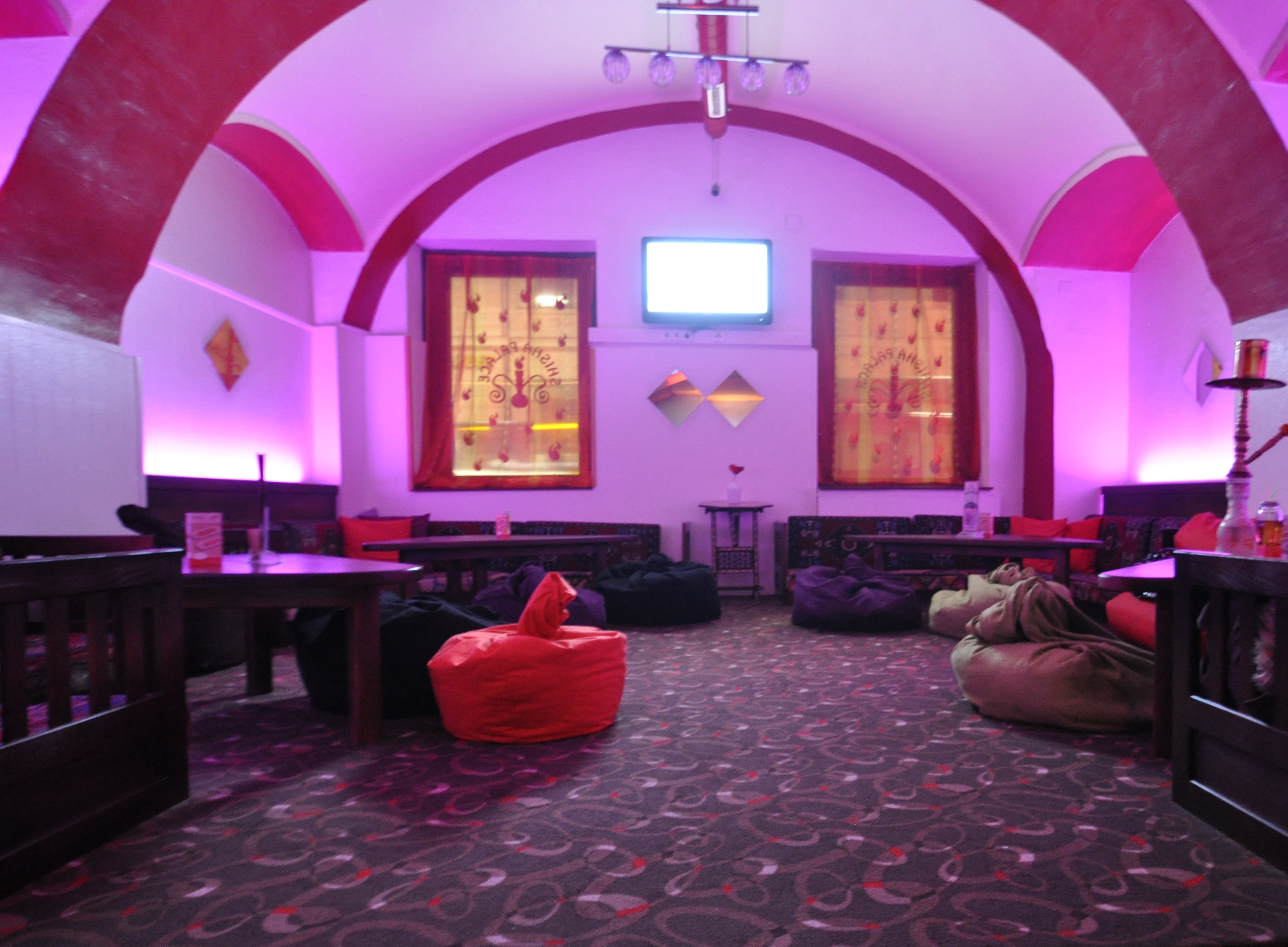 Dieses Bilddokument zeigt einen Innenraum in einem europäischen Shishalokal (Graz, Österreich). Mit Sitzkissen, orientalischen Ornamenten am Boden sowie der bogenförmigen Deckengestaltung versucht man, Flair und Atmosphäre zu erzeugen.